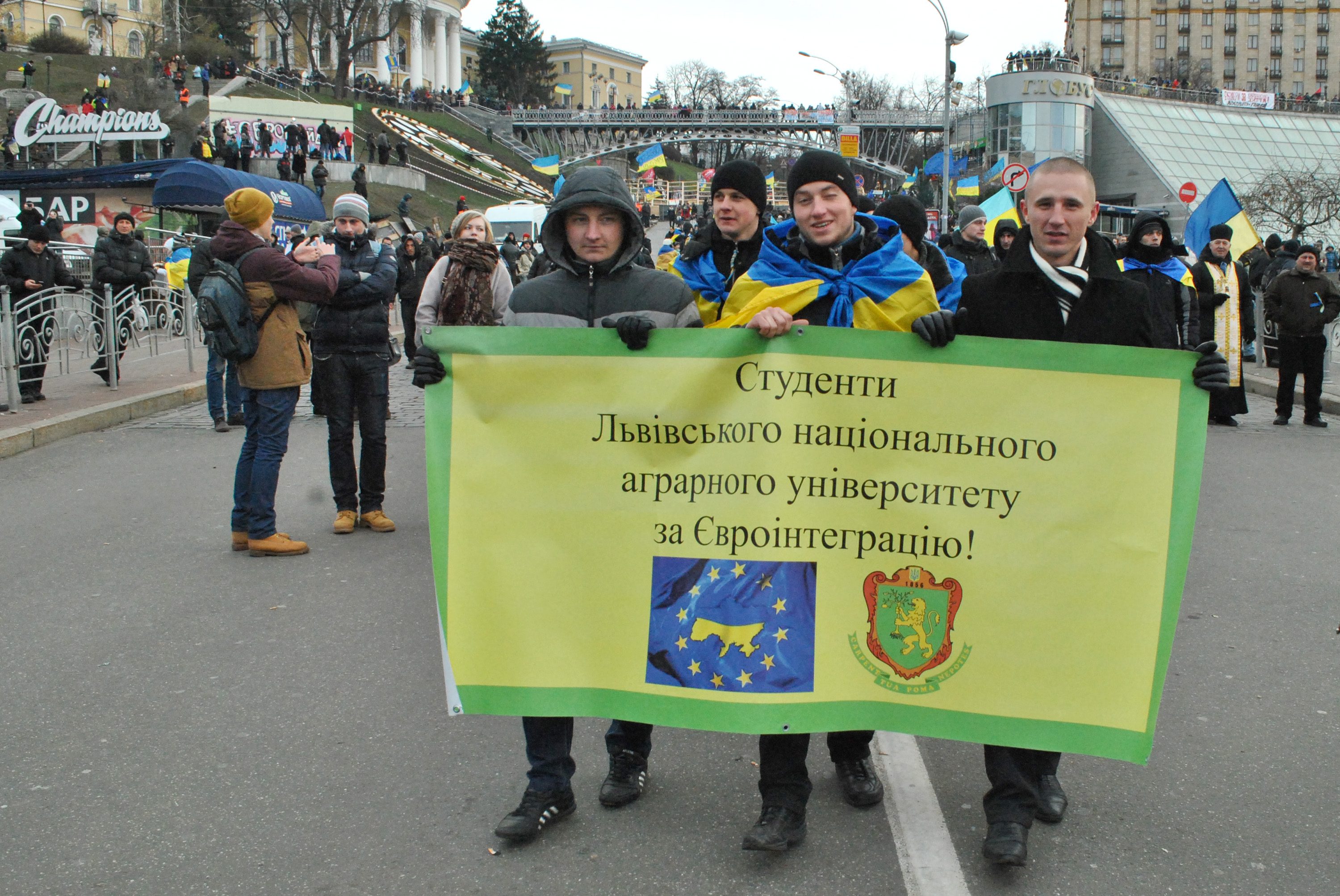 Студенти Львівського національного аграрного університету під час Євромайдану в Києві 3 грудня 2013 року.